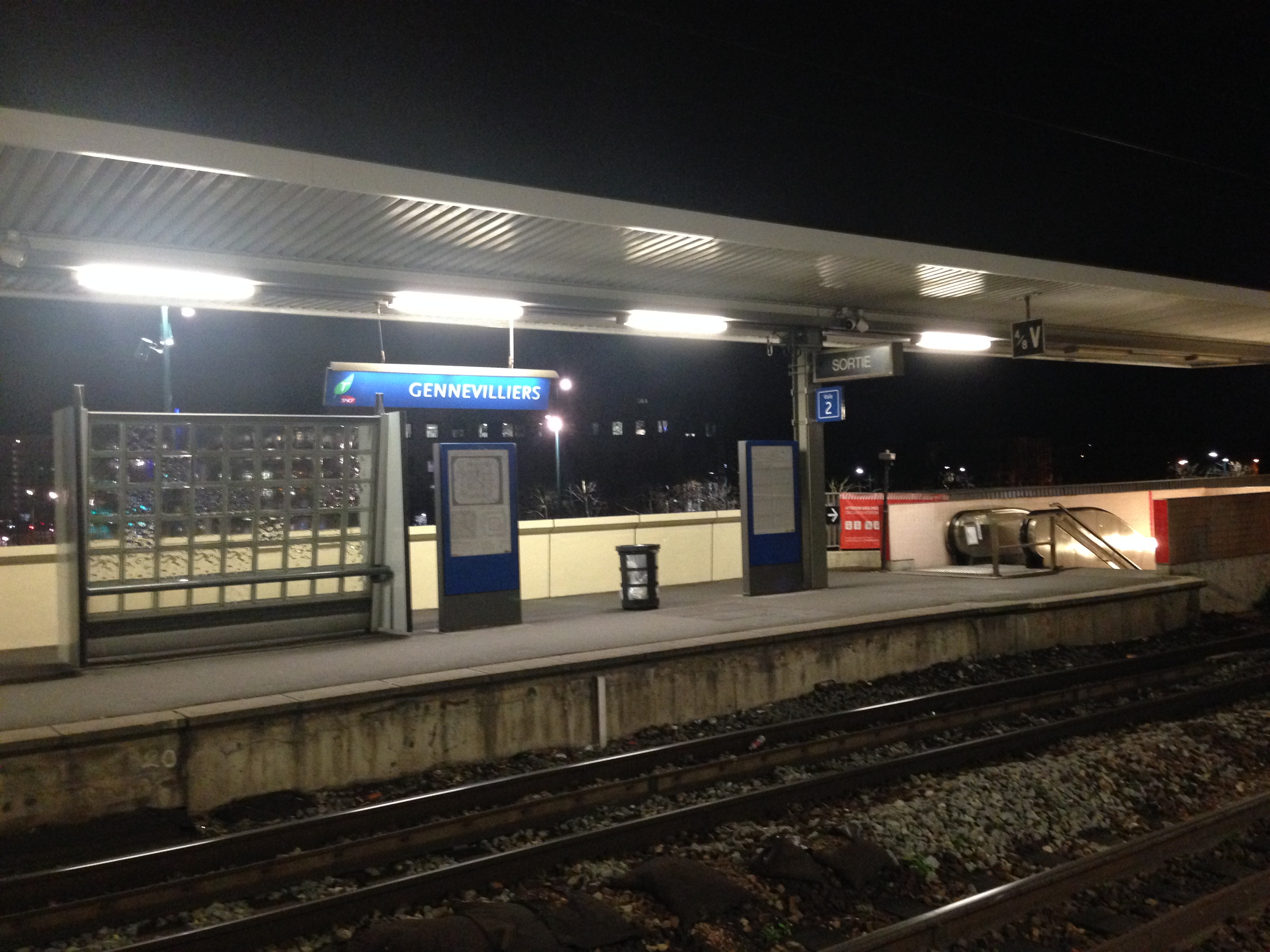 Gare de Gennevilliers-2016